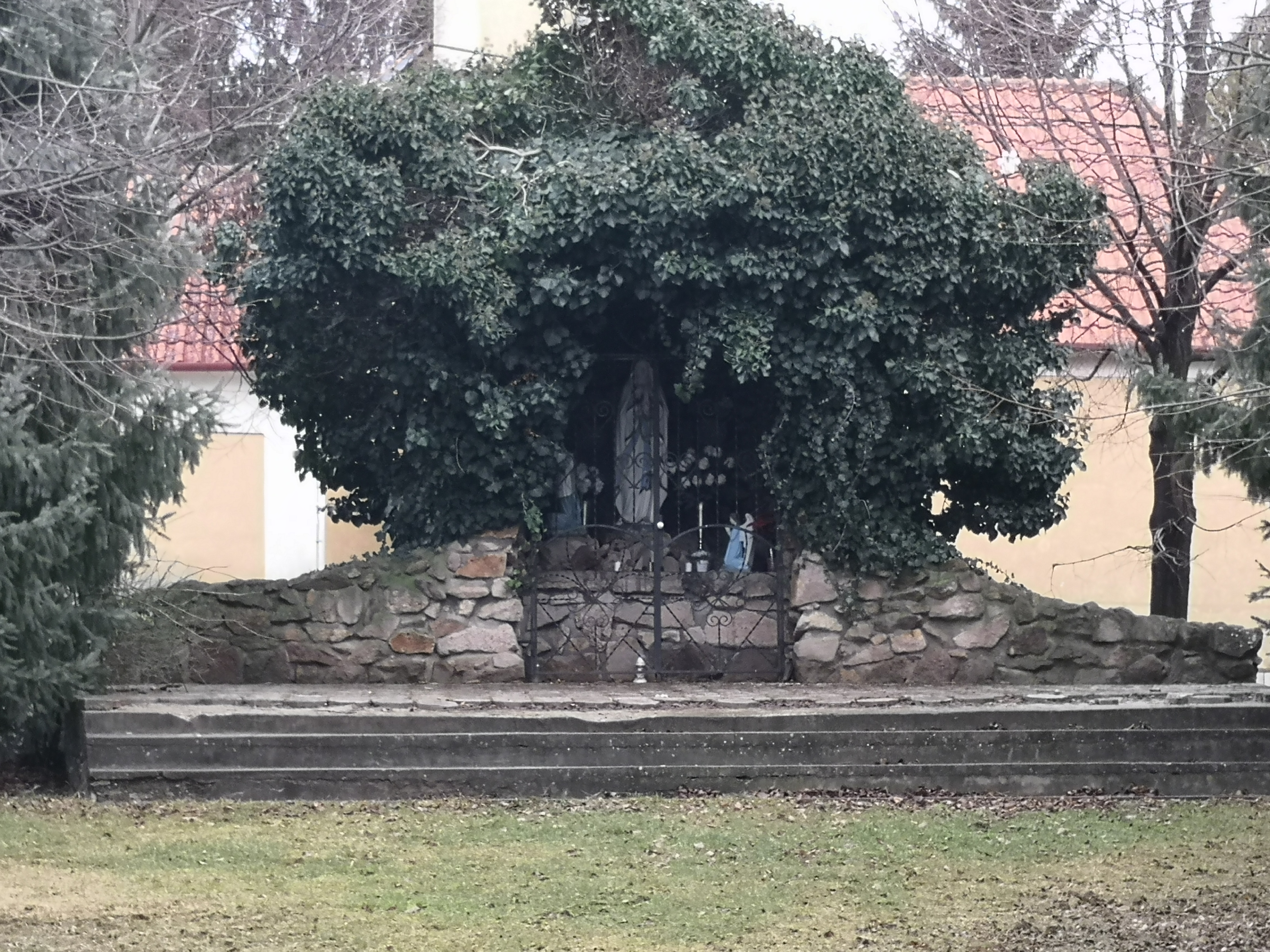 Kaplnka Panny Márie sa nachádza uprostred obce vedľa starej budovy Základnej školy v Pate, za starým, nevyužívaným Kostolom Narodenia Panny Márie